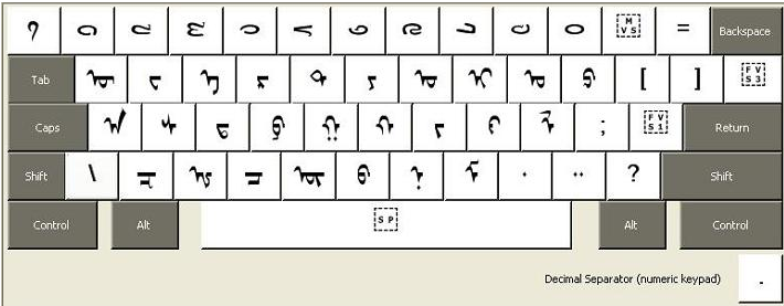 старомонольская клавиатура